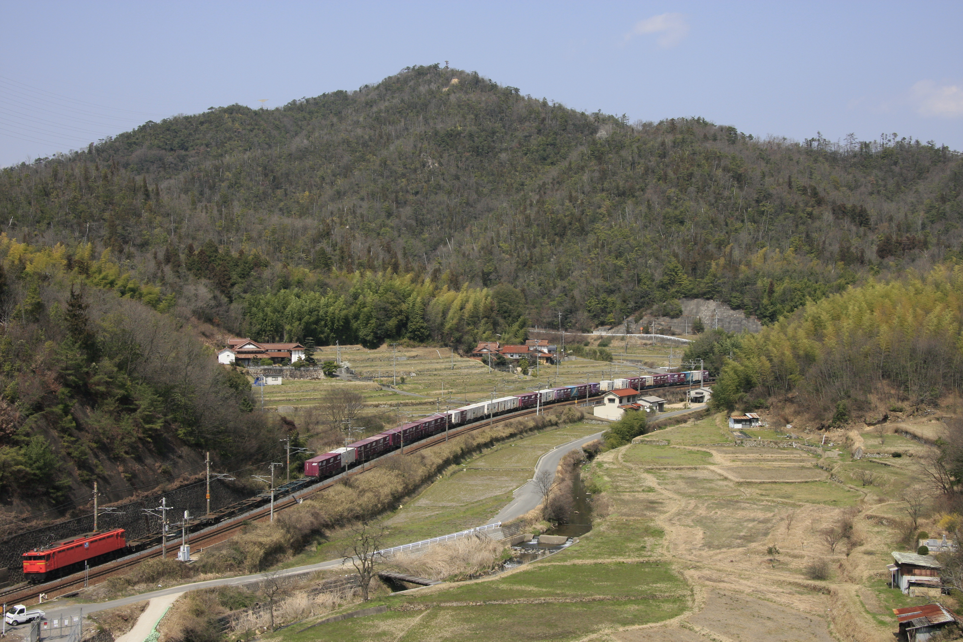 EF67[広]が後部補機をつとめる5092レ(本務機EF65[岡])